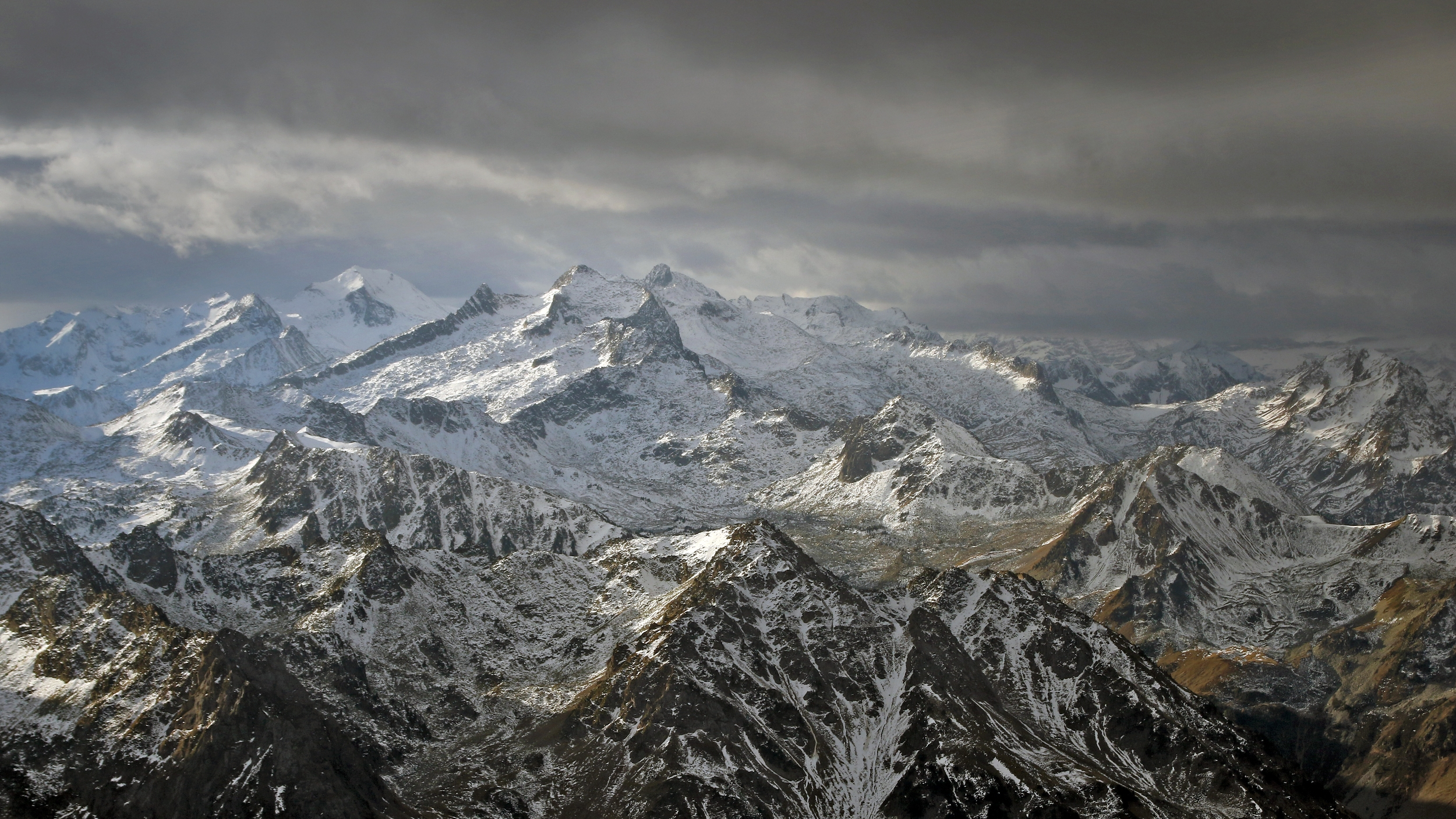 Massif du Néouvielle depuis le Pic du Midi à 2876 m